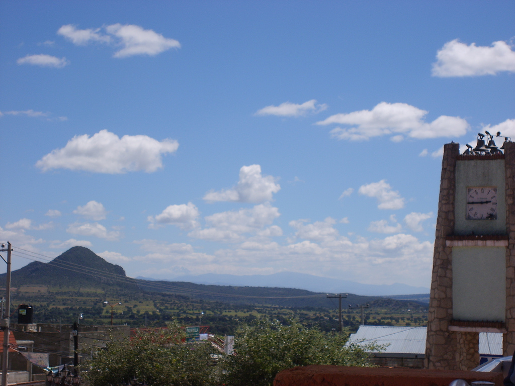 Pachuquilla